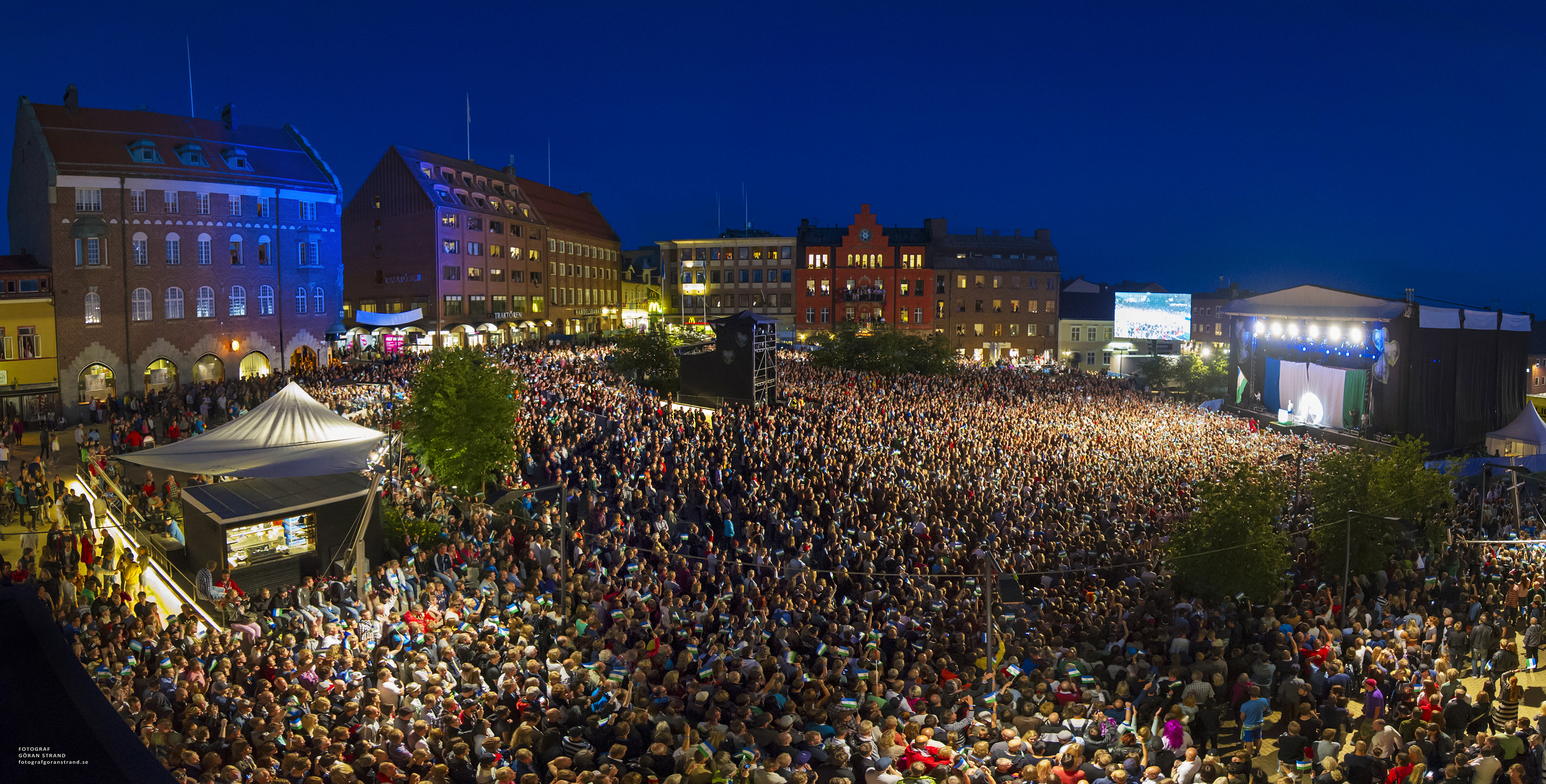 Stortorger i Östersund under Storsjöyran